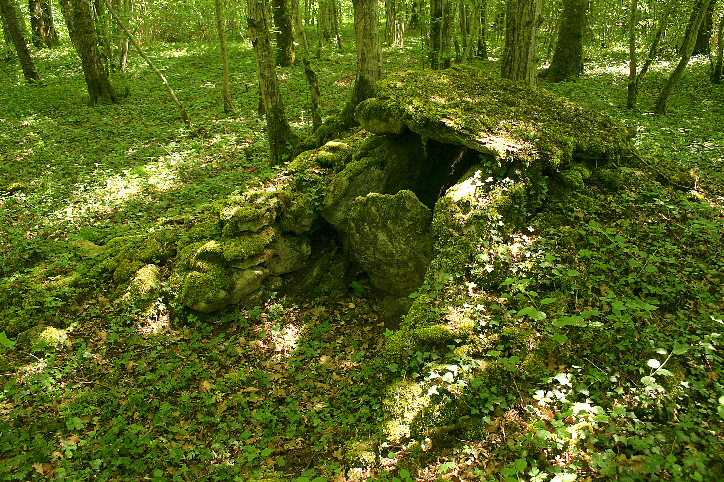 Sépulture néolithique